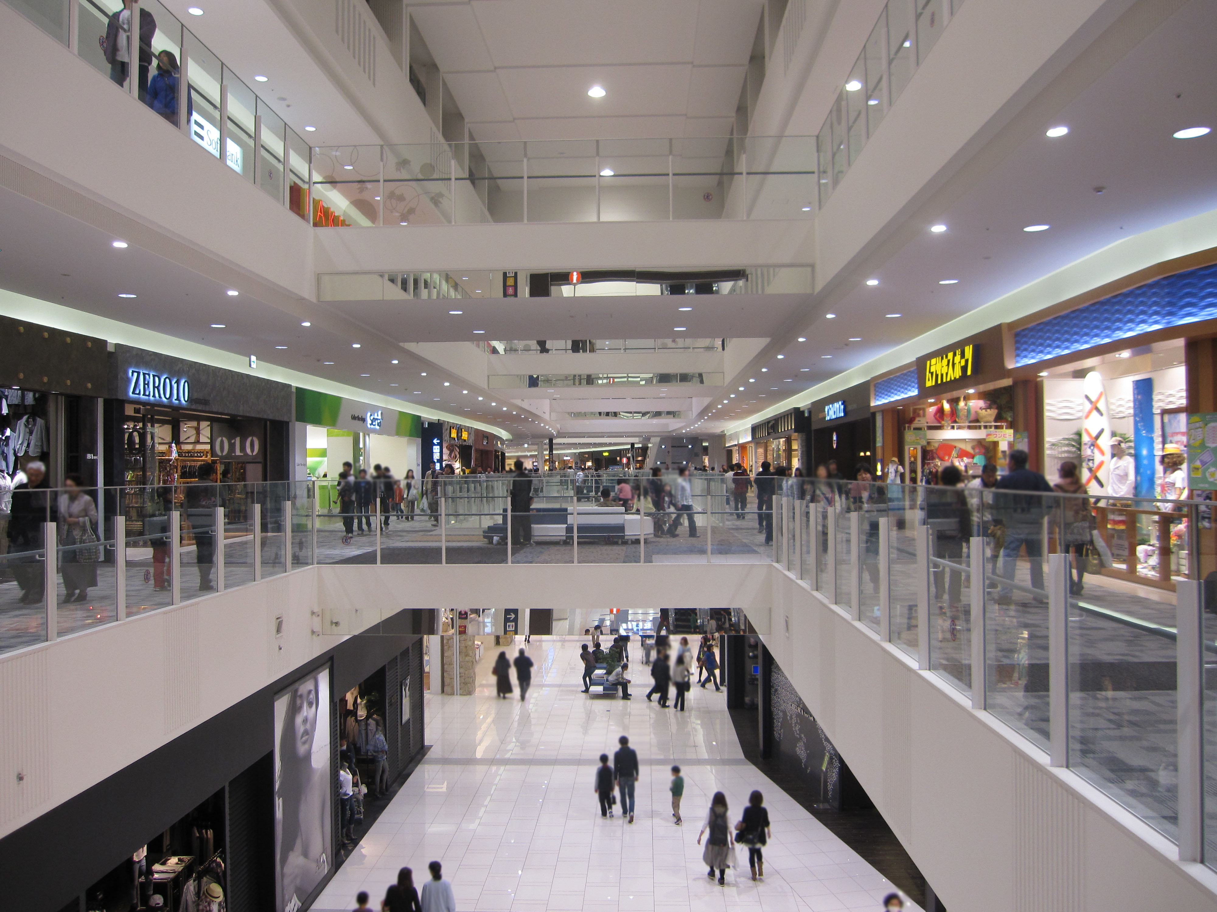 イオンモール大和郡山2Fから